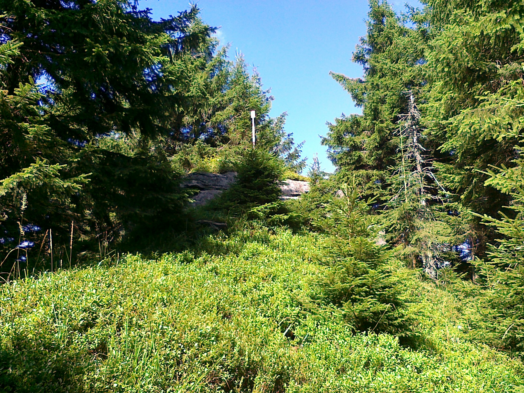 Skalisko szczytowe góry Medvědí hřbet - 1260 m n.p.m.